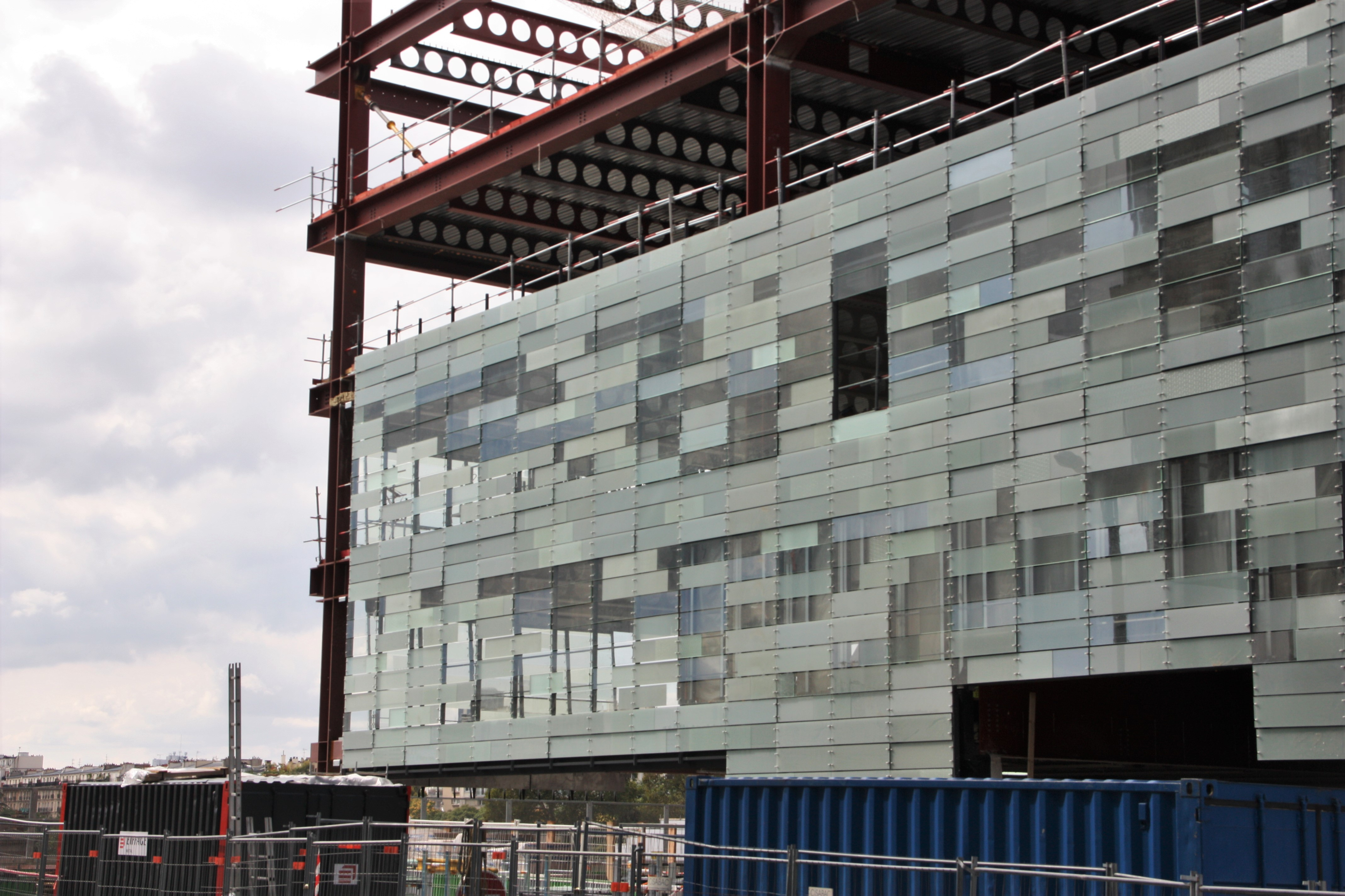 Paris Rive Gauche